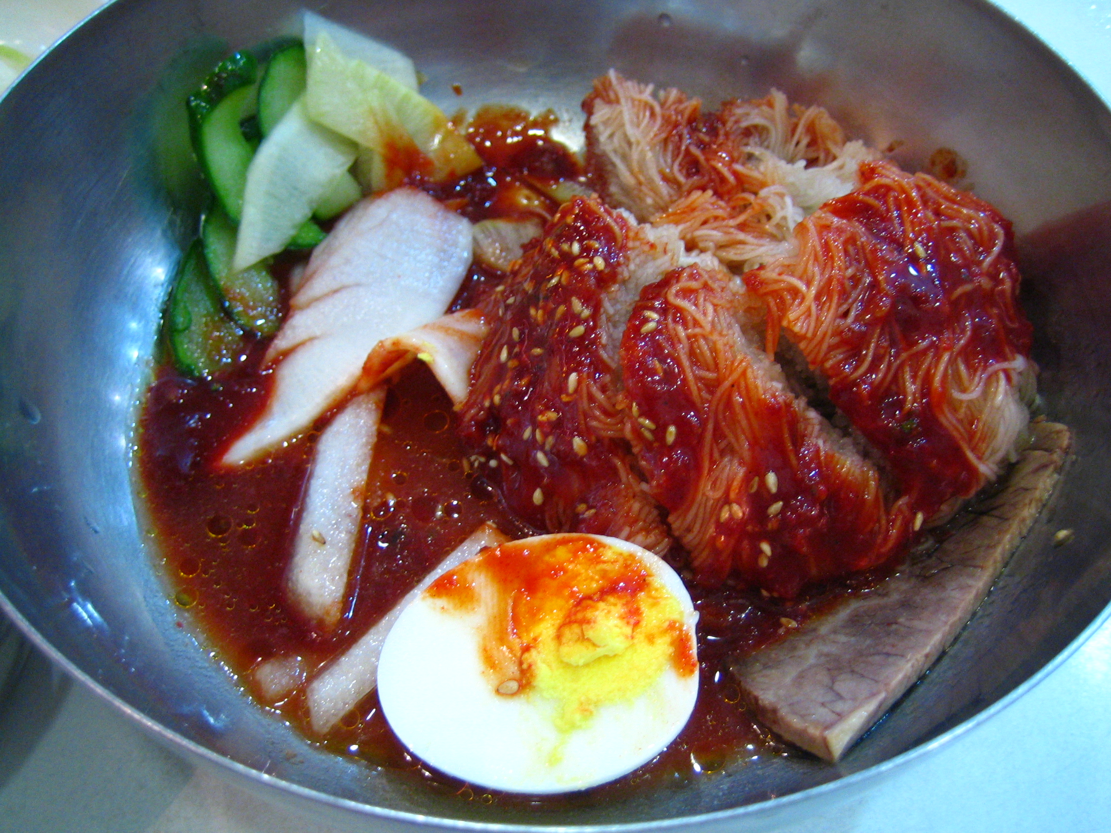 비빔냉면, Bibim-naengmyeon , ピビンネンミョン